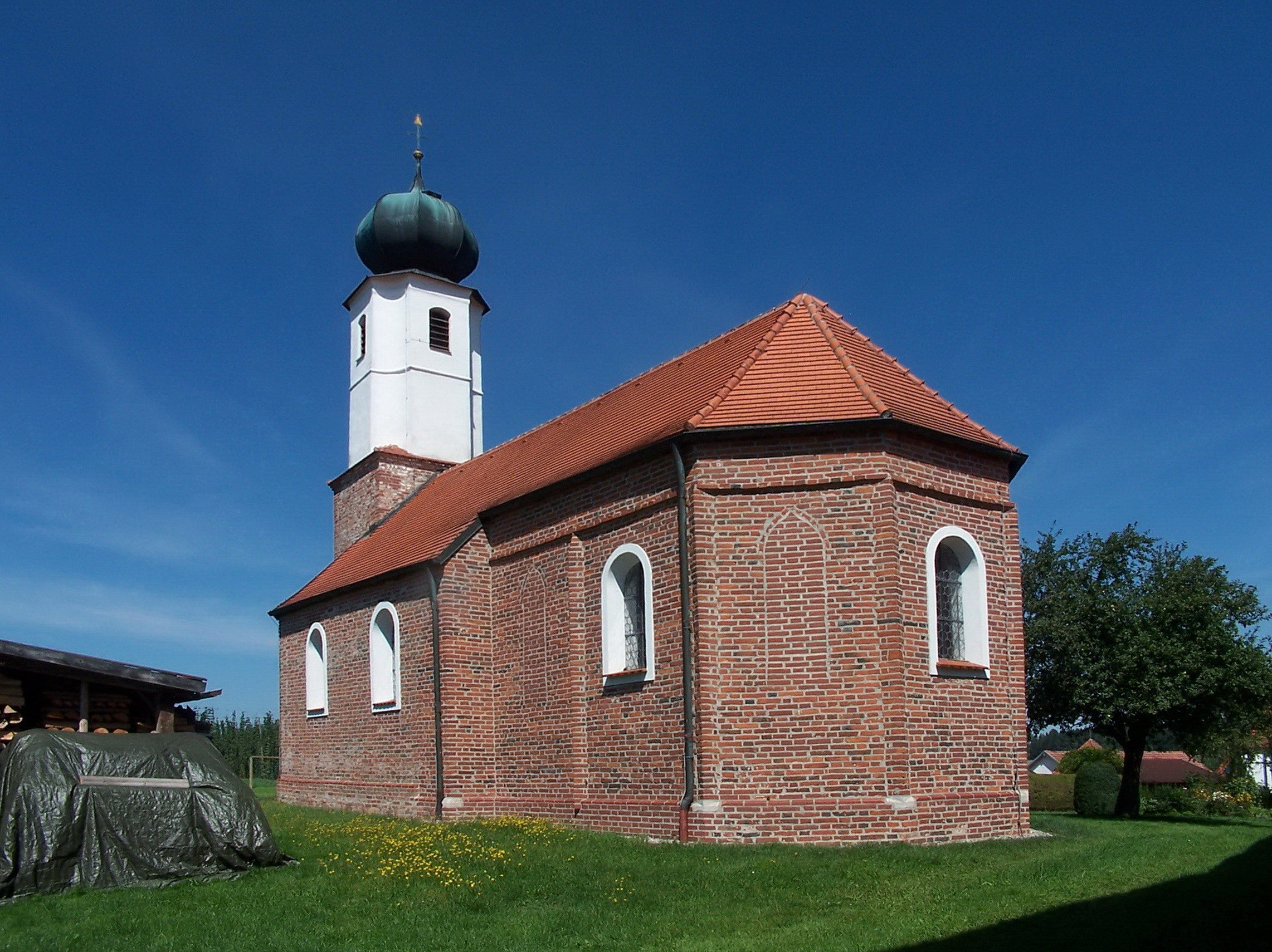 Koppenwall 14. Ehemalige Wallfahrtskirche St. Corona. 2. Hälfte 15. Jh., Turmoberbau barock; mit Ausstattung.